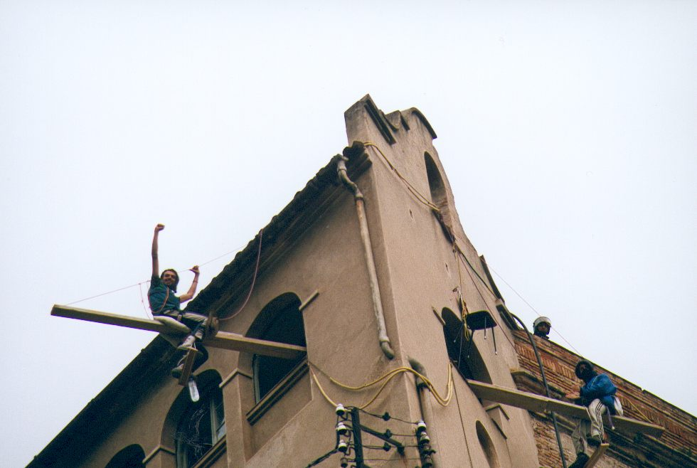 Dos okupas resistan el desalojo de Can Masdeu en 2002. Un policia asoma la cabeza desde el techo.